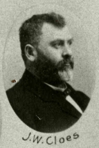 Rep J.W. Cloes